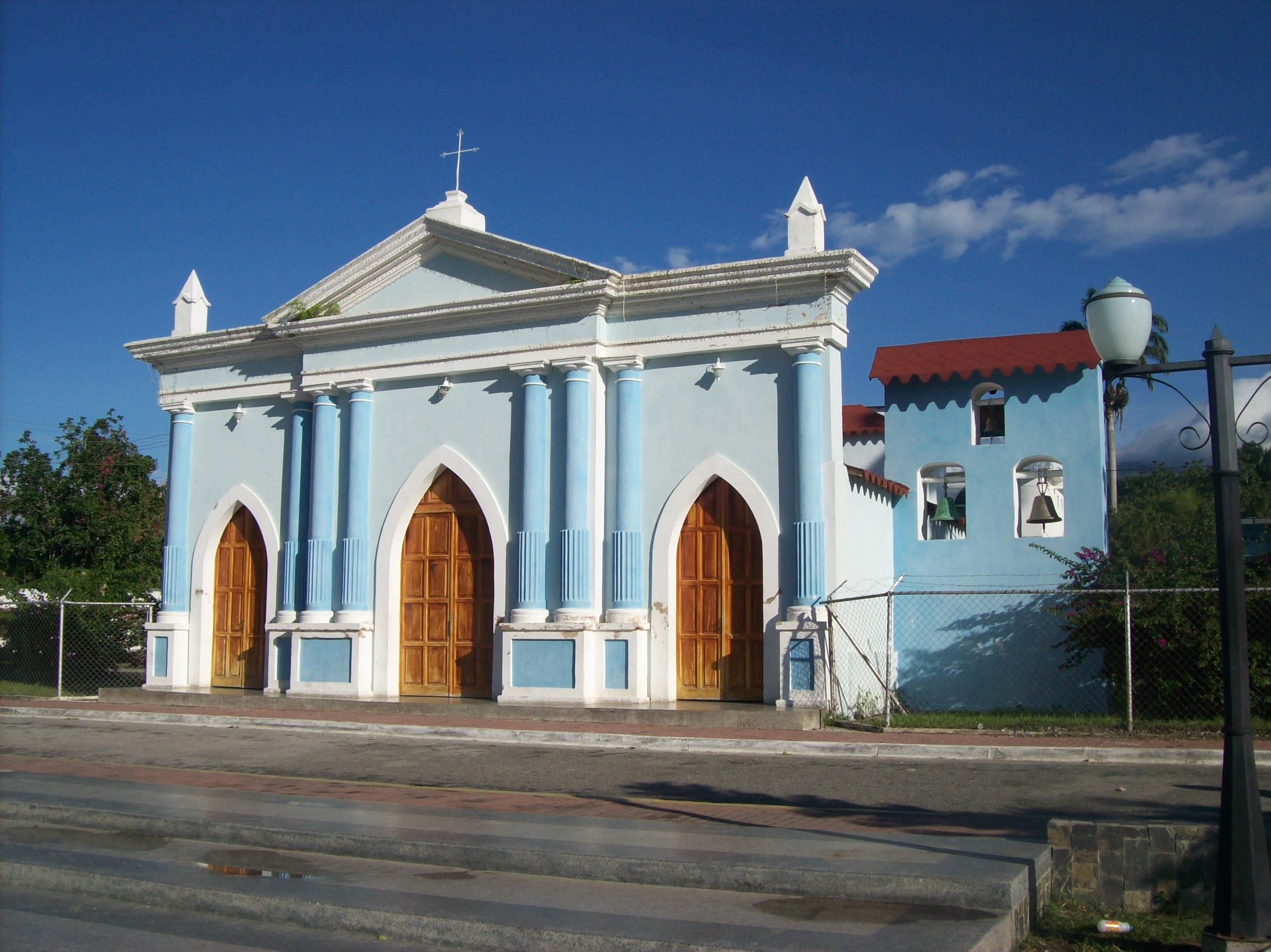 Santa Iglesia de San Pablo, Capital del municipio Aristides Bastidas, estado yaracuy, Venezuela